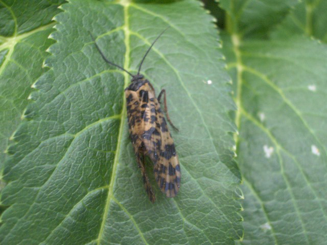 Siulasirvikäs sijoitettuna väinönputken (Angelica archangelica) lehdelle